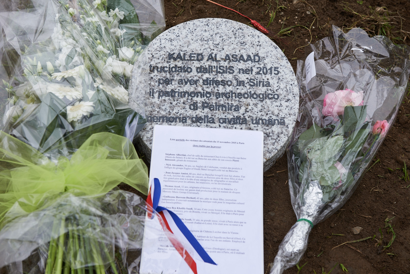 Il cippo dedicato a Khaled al Asaad al Giardino dei Giusti di Milano